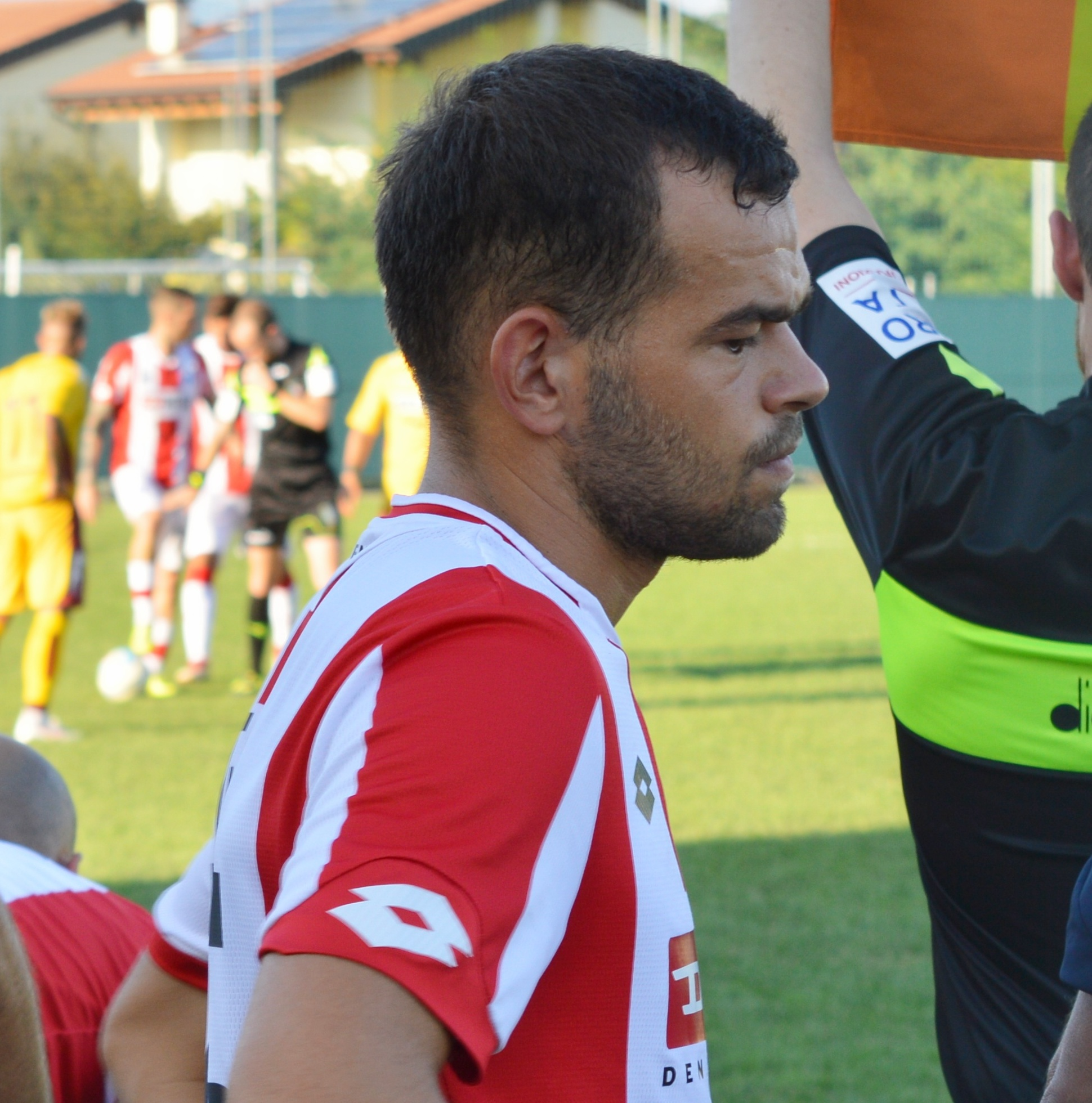 Ardit Gashi entra in campo per Vicenza-Cittadella, amichevole, stadio di Caldogno (VI)